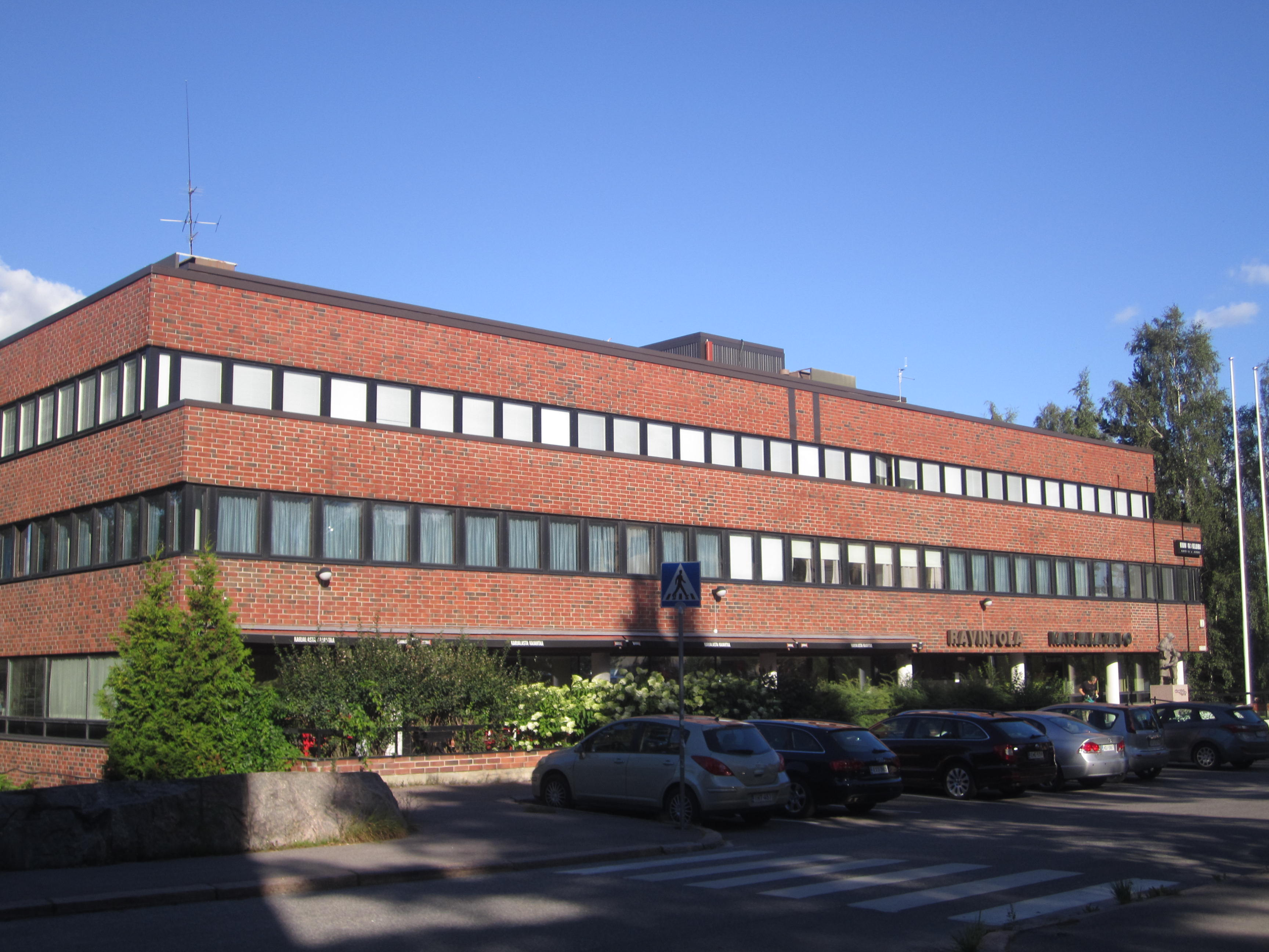 Karjalatalo Helsingissä.